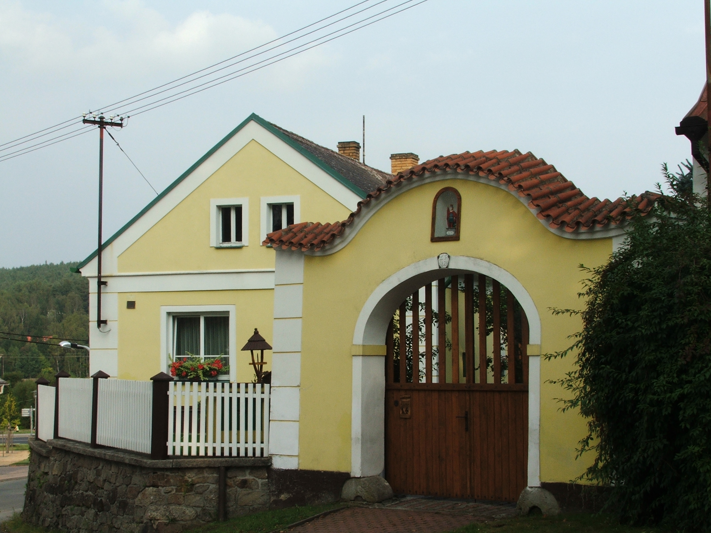 Brána usedlosti čp. 14, Kaznějov 14, Kaznějov.